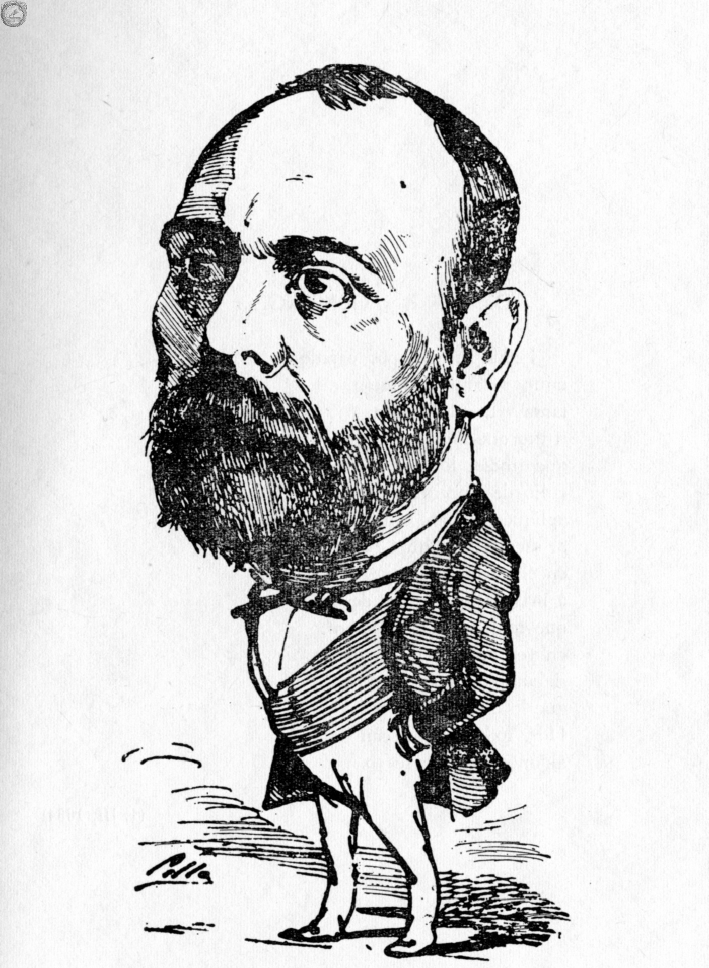 Rafael Cervera y Royo, caricatura de Ramón Cilla aparecida en El Dr. Sangredo. Revista satírica quincenal. Dedicada a los hijos de Esculapio (1884-05-01, vol. I, nº 13, p. 216)